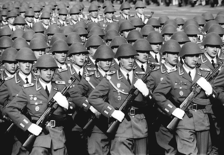 Berlin, 25. Jahrestag DDR-Gründung, Parade ADN-ZB Spremberg 7.10.74 Berlin: 25. Jahrestag-Ehrenparade der NVA -Vorbeimarsch eines Marschblocks der Luftstreitkräfte-Luftverteidigung an der Ehrentribüne während der einstündigen beeindruckenden Ehrenparade der Nationalen Volksarmee auf der Berliner Karl-Marx-Allee. (Siehe ADN.Meld. vom 7.10.74)